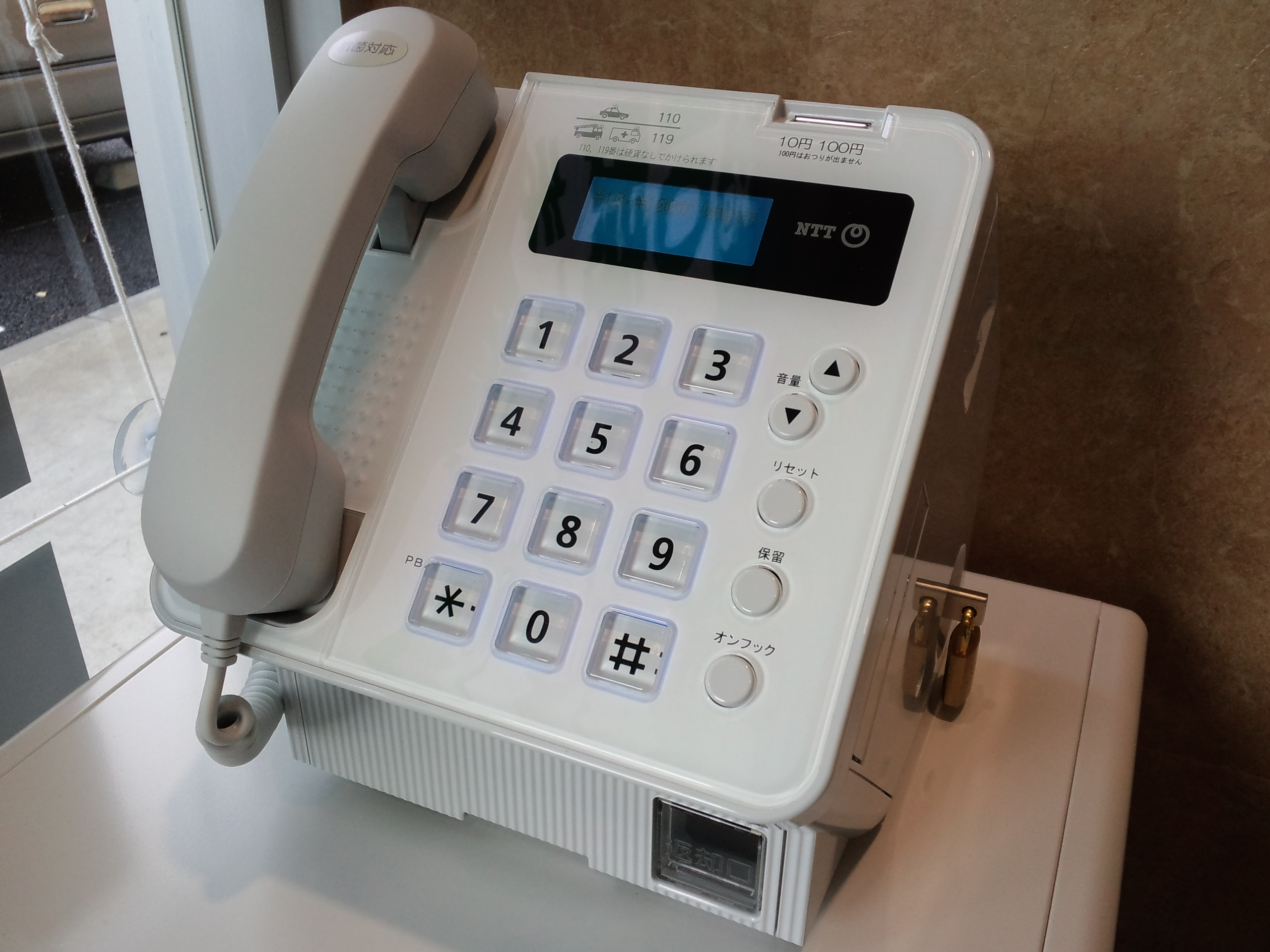 CA3H0098